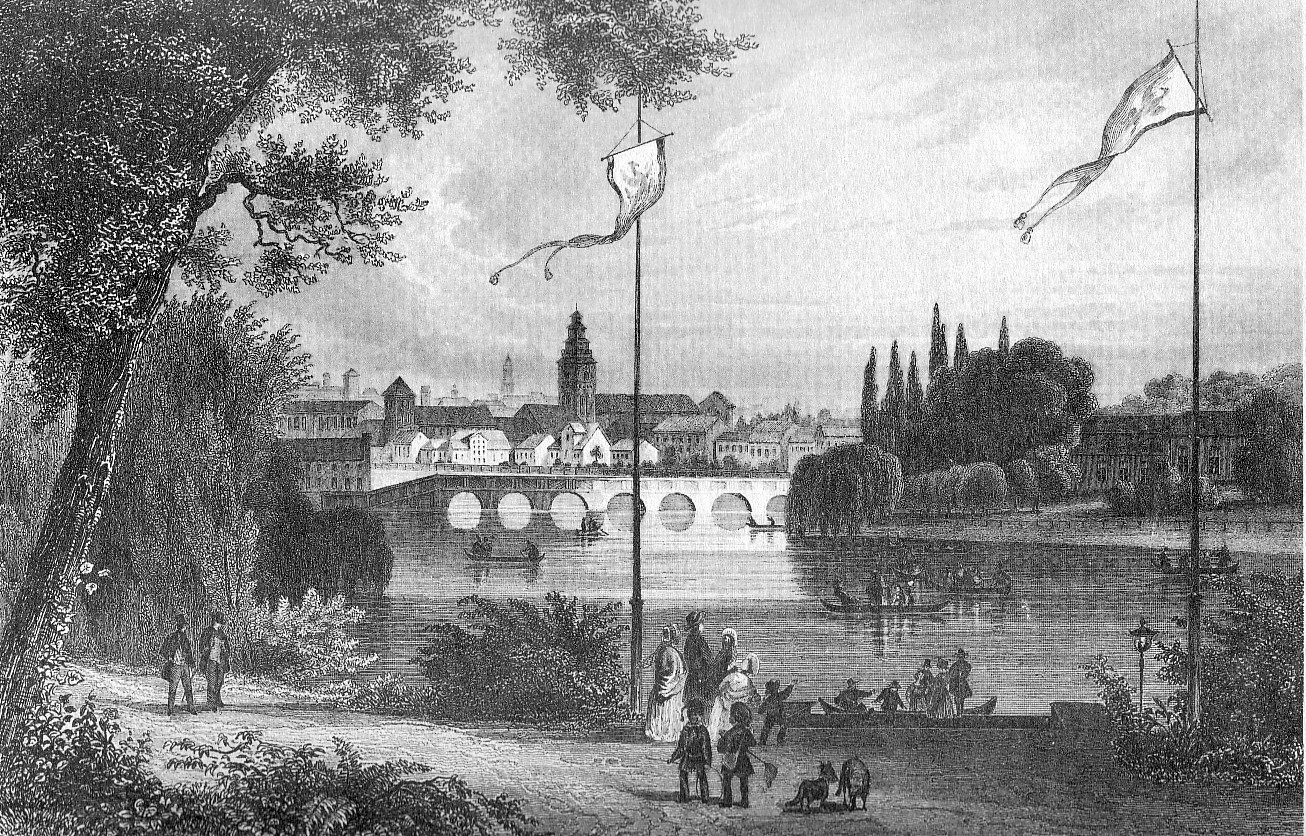 Historische Ansicht von Königsberg in Ostpreußen (heute Kaliningrad in Russland). Stahlstich.